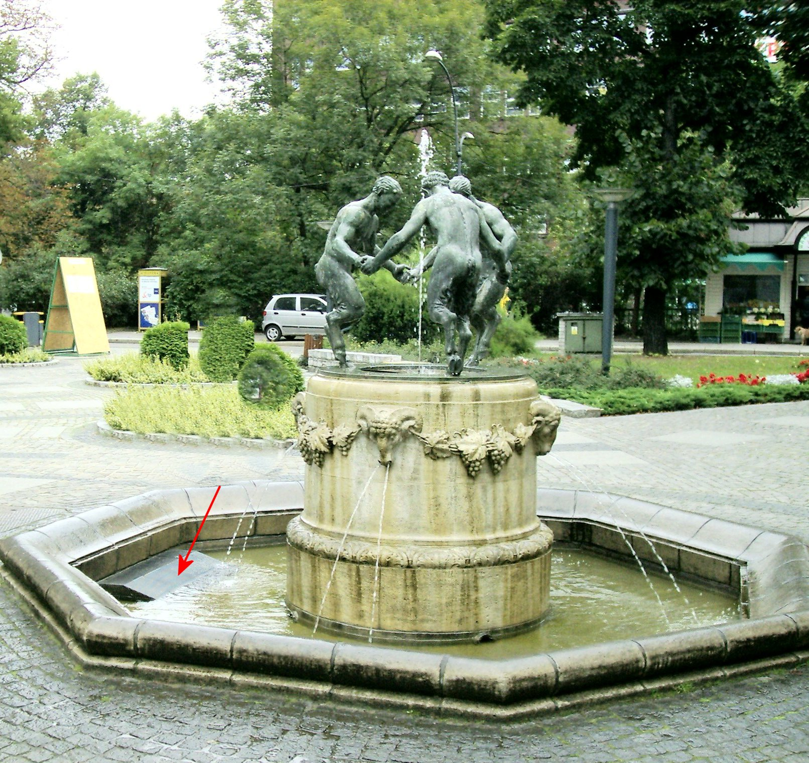 Ekologiczna fontanna w Gliwicach. Odpowiednio profilowany schodek (wskazuje go strzałka) umożliwia ptakom korzystanie z wody.